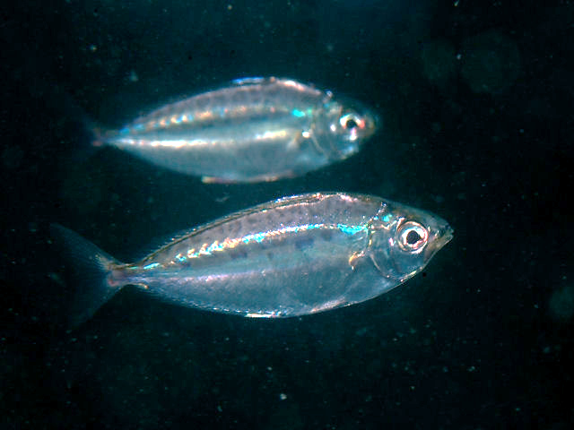 オキヒイラギ Equulites rivulatus